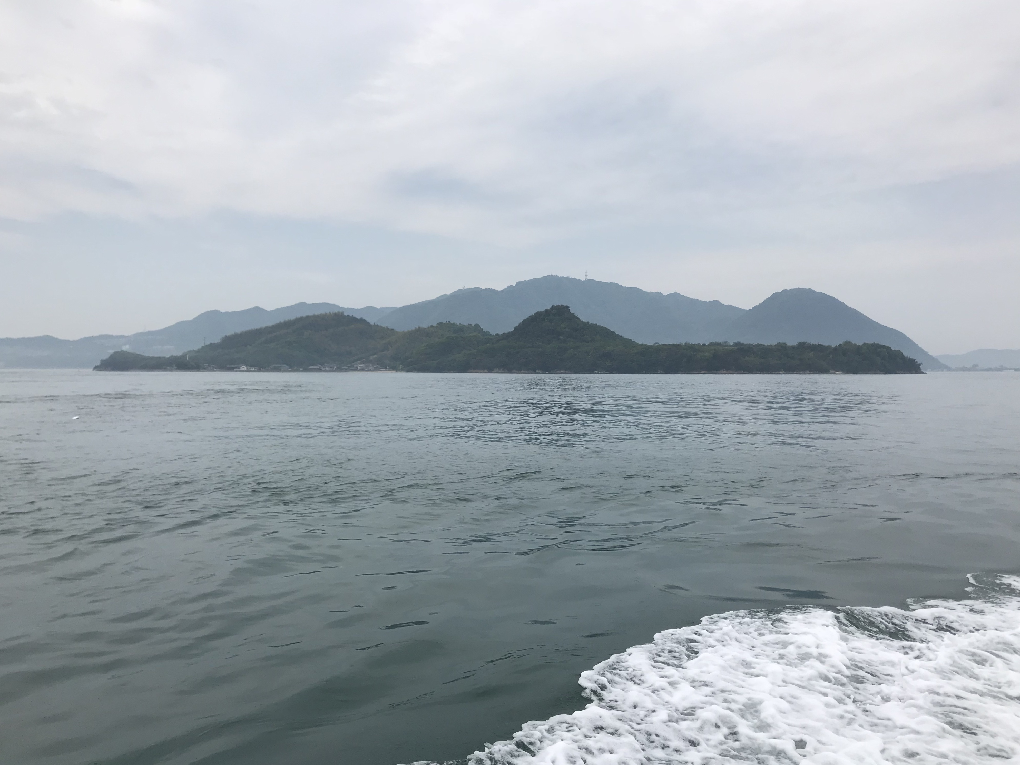 土生港行きの高速船より望む小佐木島、筆影山と竜王山